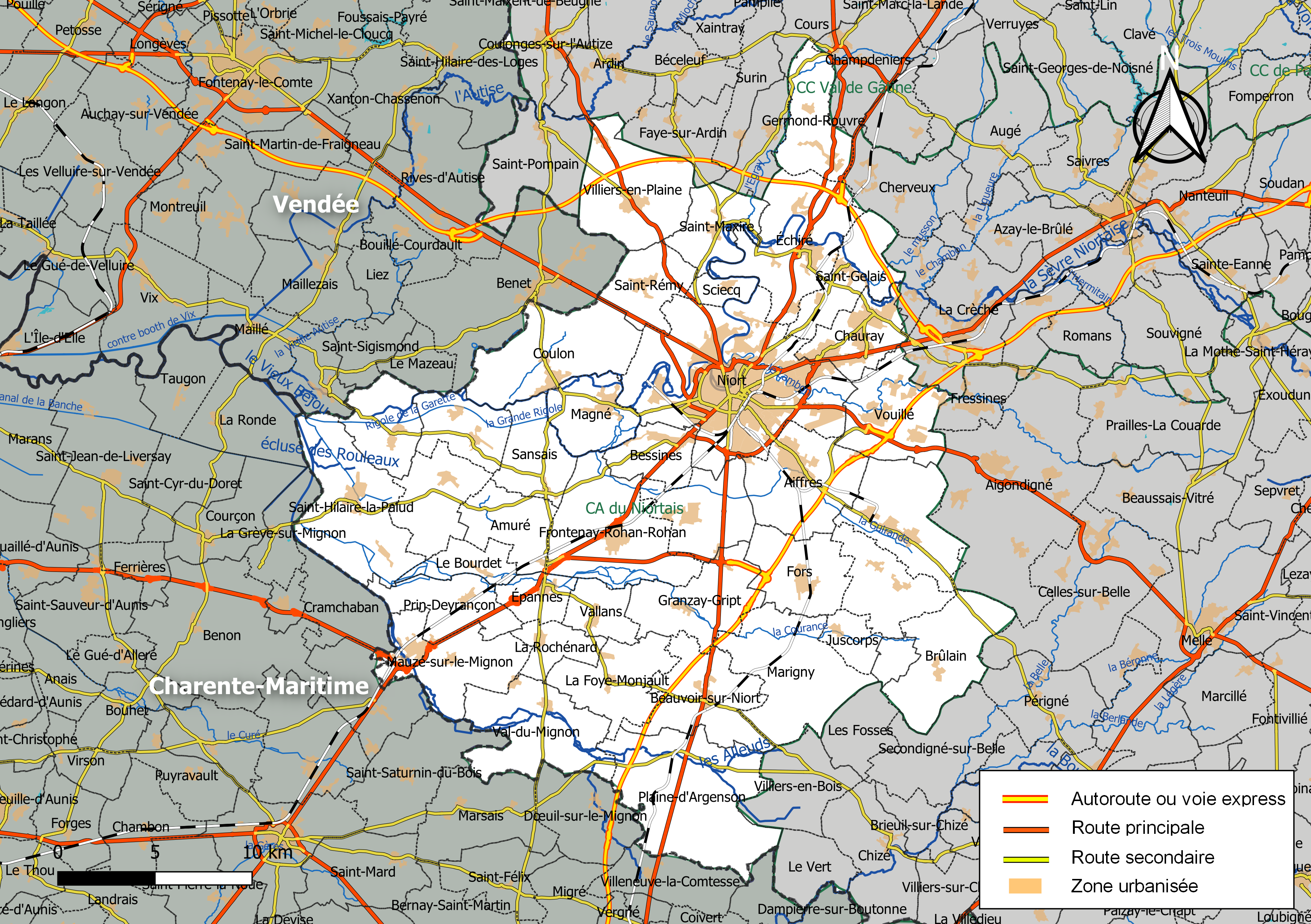 Carte géographique de la Communauté d'agglomération du Niortais, département des Deux-Sèvres, France. Composition au 1er janvier 2019.